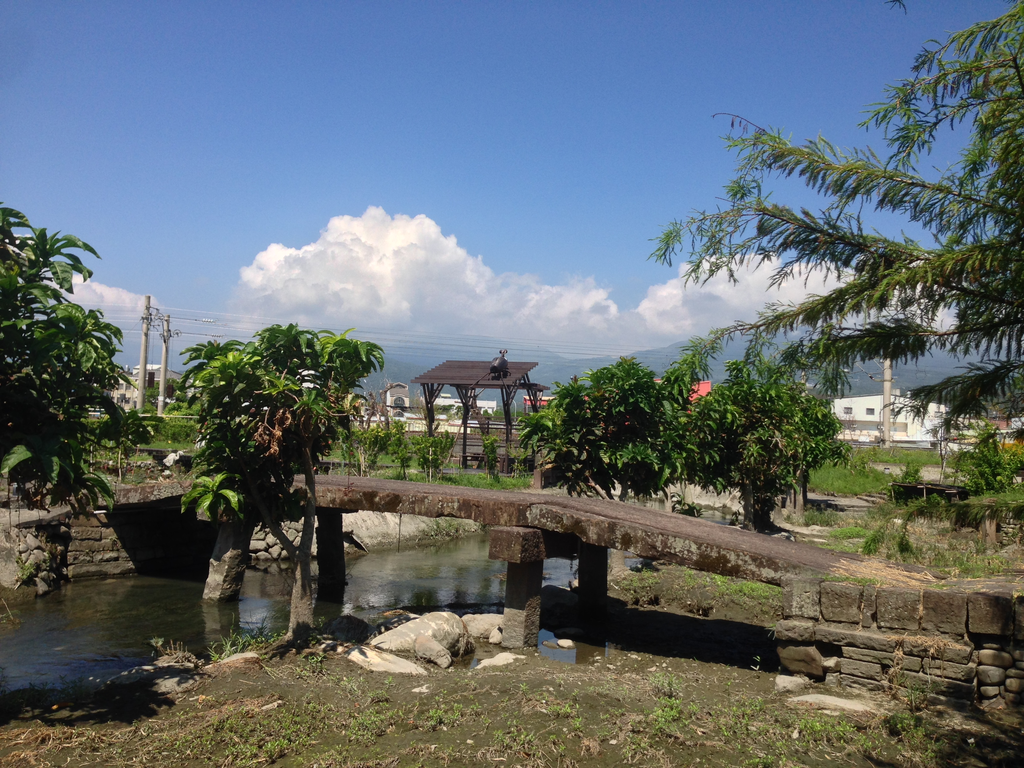 中文（台灣）: 武暖石板橋